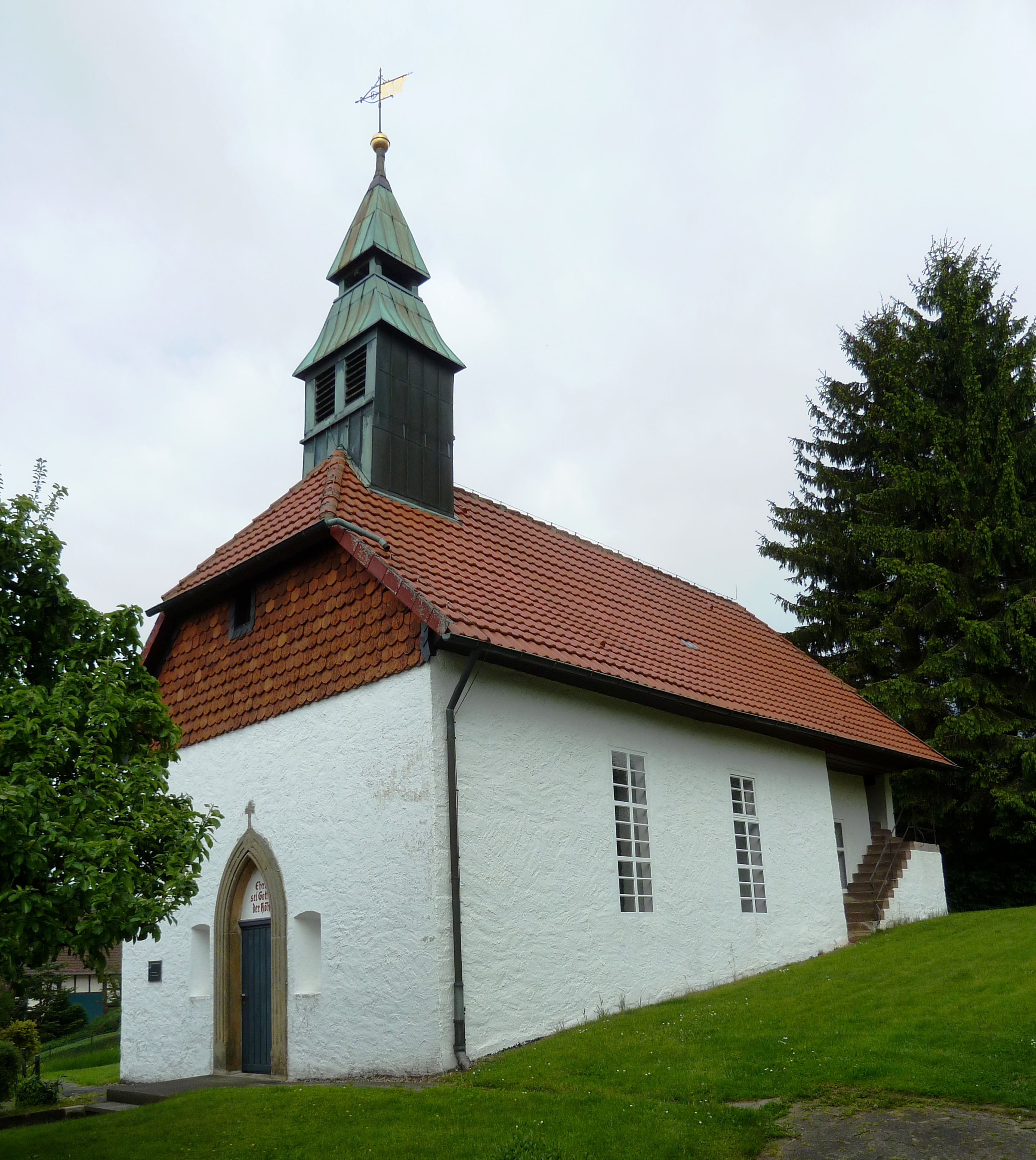 Ev.-luth. Kirche St. Pankratius in Denkershausen, Stadt Northeim, Südniedersachsen. Erbaut 1653, renoviert/geändert 1875